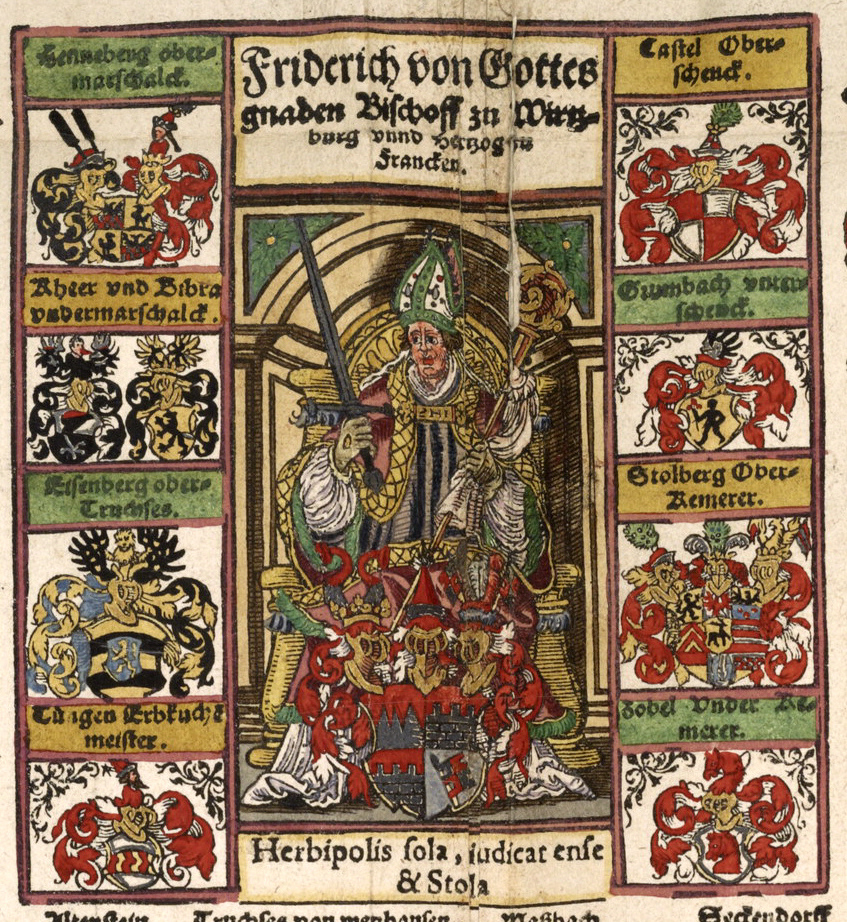 Bischof Friedrich von Wirsberg, sein Wappen (und die Wappen der Mitglieder des Domkapitels?), Detail aus: Der Geschlechter von Fursten, Graffen, Herrn, vnd vom Adel, Wappen mit Schilten vnd Helmen, so von dem hochloblichen Stifft Wirtzburg vnd Hertzogthumb zu Francken Lehen Tragen. Druck, handkoloriert